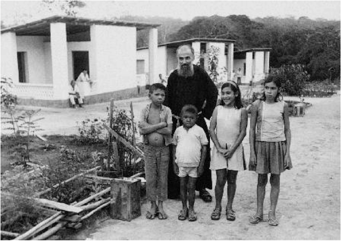 Frei Alberto com alguns meninos na Vila San Marino por ele realizado.